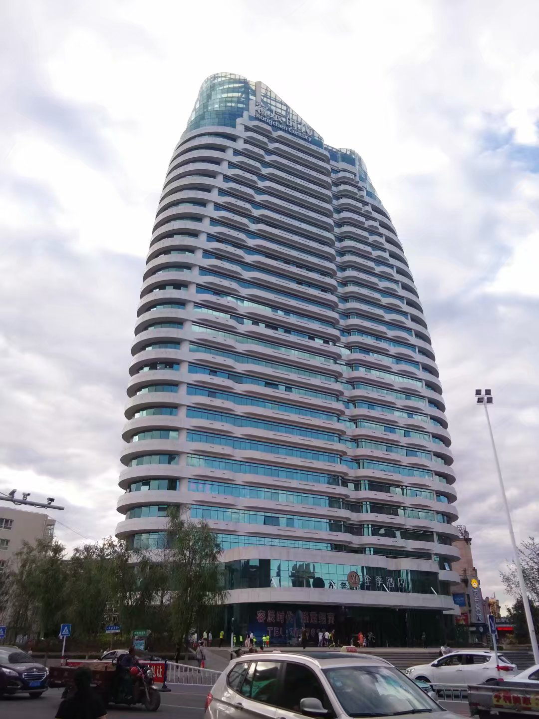 中文（中国大陆）: 河北省张家口市容辰时代大楼